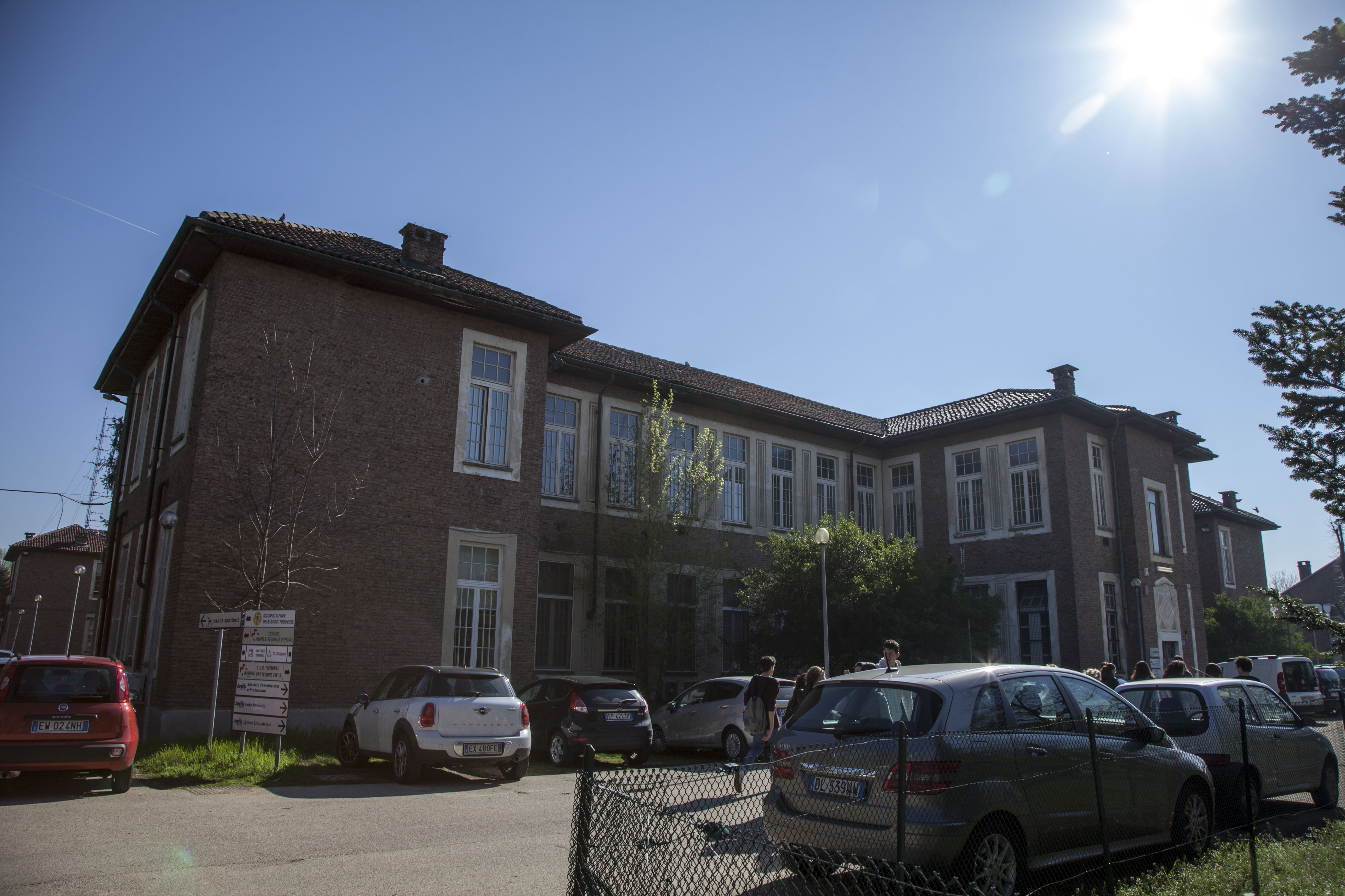 מחנה העקורים גרוליאסקו